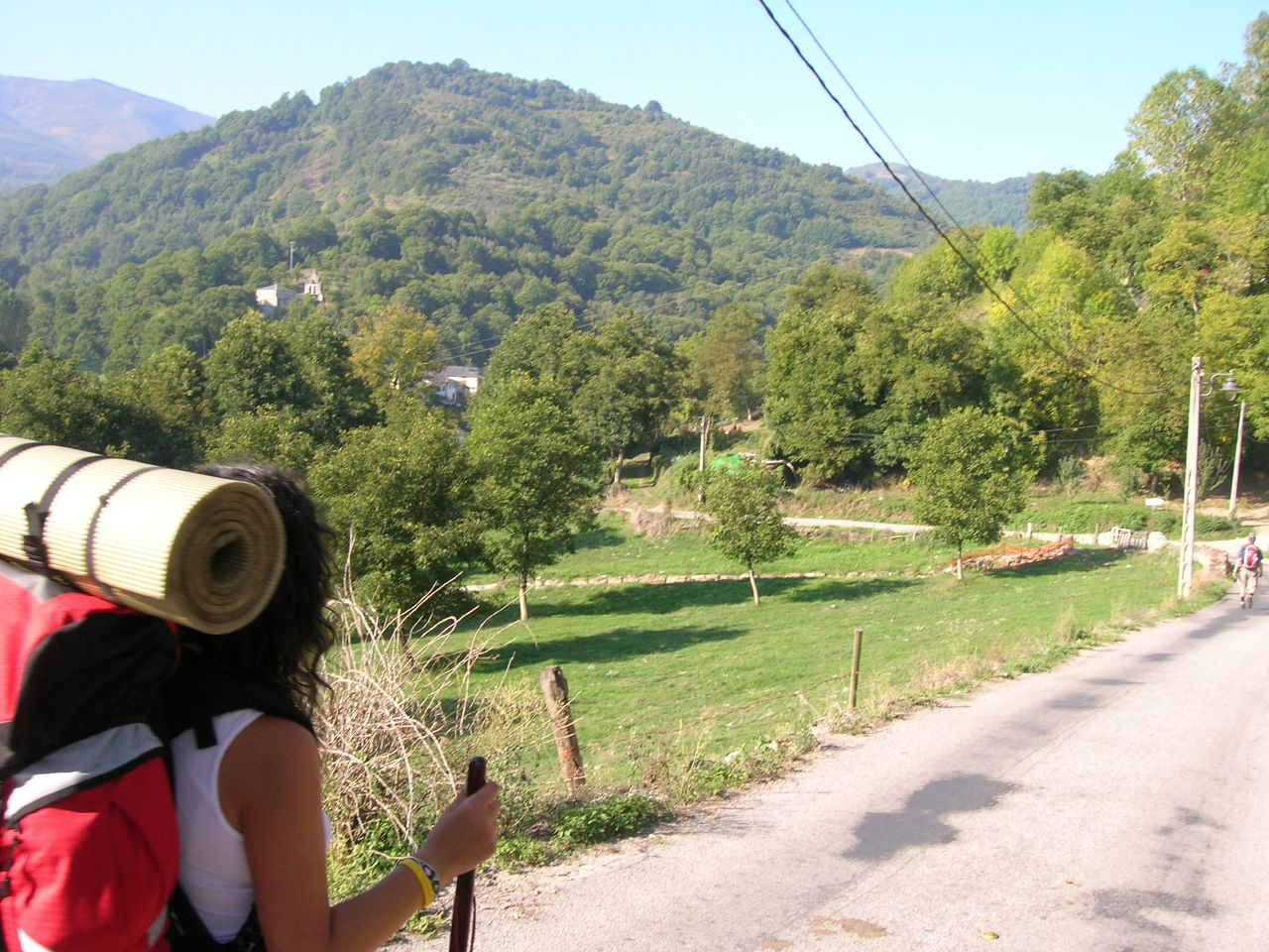 cerca der Ruitelán (Adentrándonos en la Sierra de Los Ancares.)